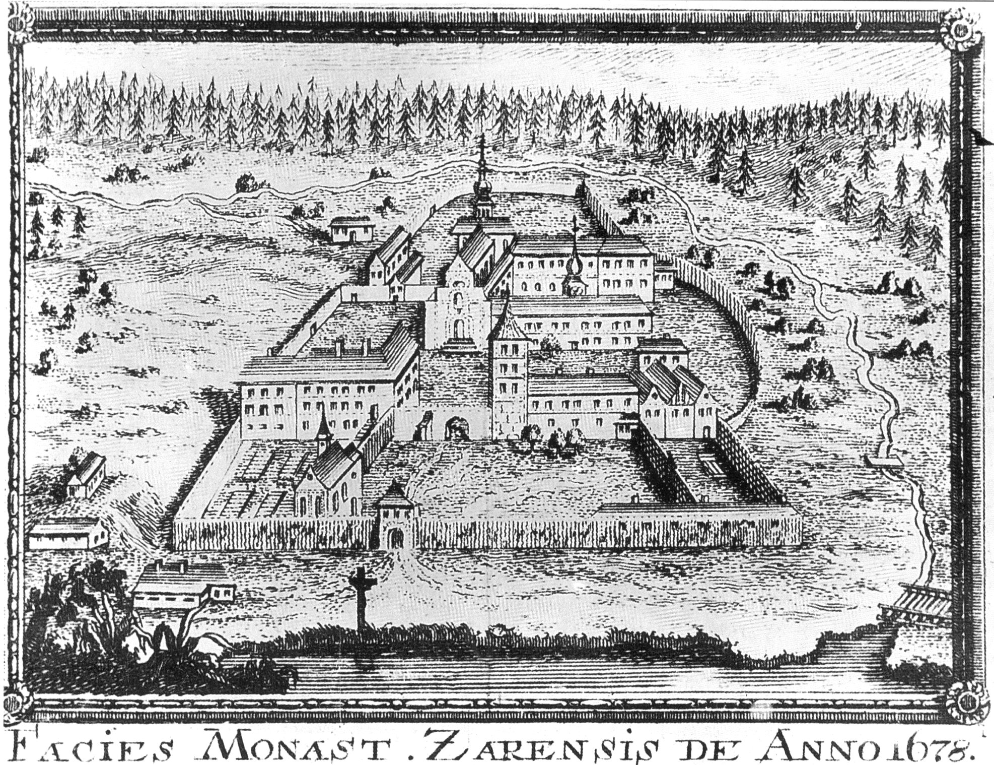 Prospekt klášterního areálu ve Žďáru nad Sázavou